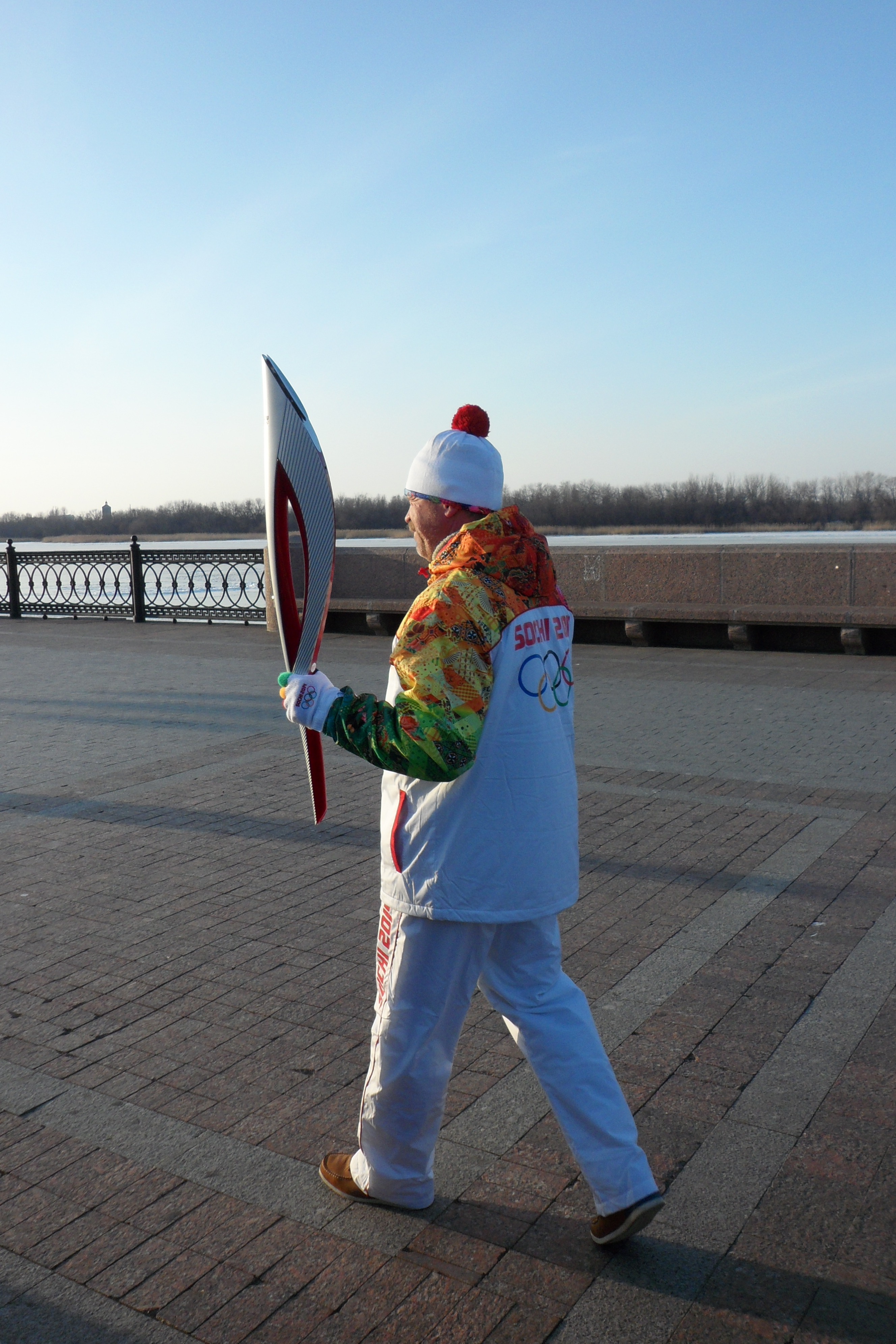 Один из факелоносцев в Астрахани